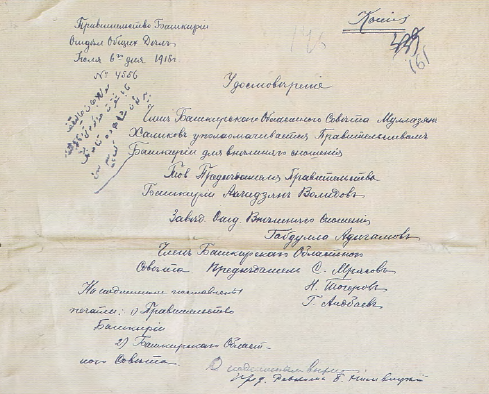 Копия удостоверения М. Д. Халикова